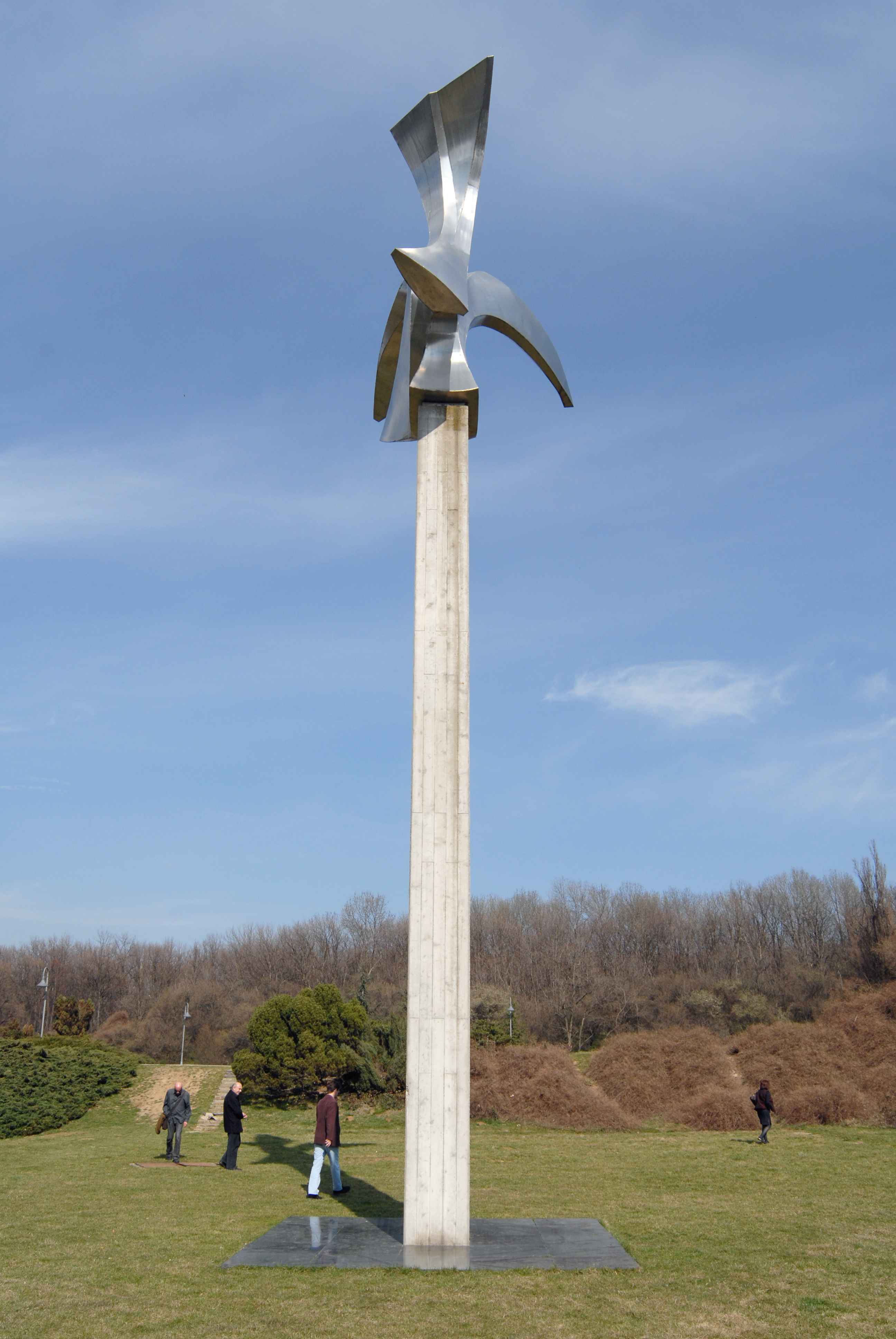 Српски (ћирилица): Спомен парк Јајинци